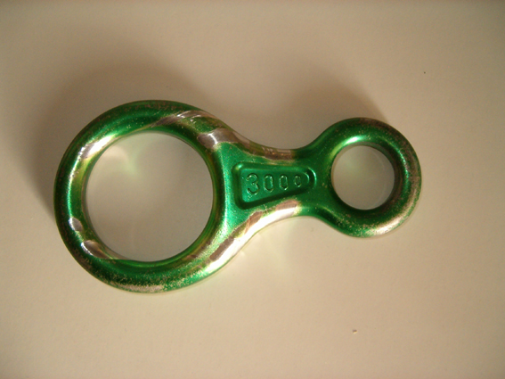 Gebruikte acht (klimsport). De wrijvingslijtage door het touw is duidelijk zichtbaar